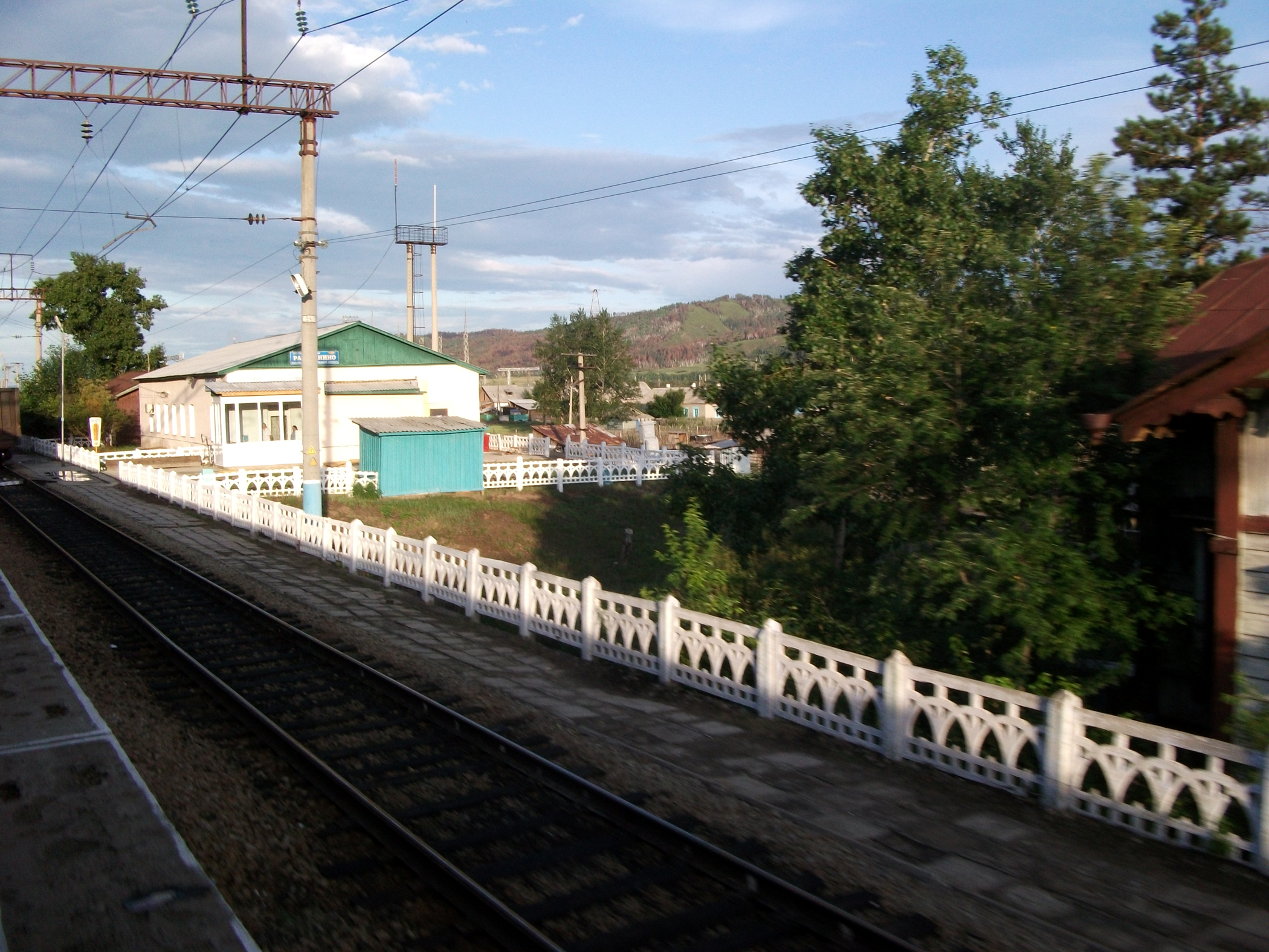 Вокзал железнодорожной станции Размахнино